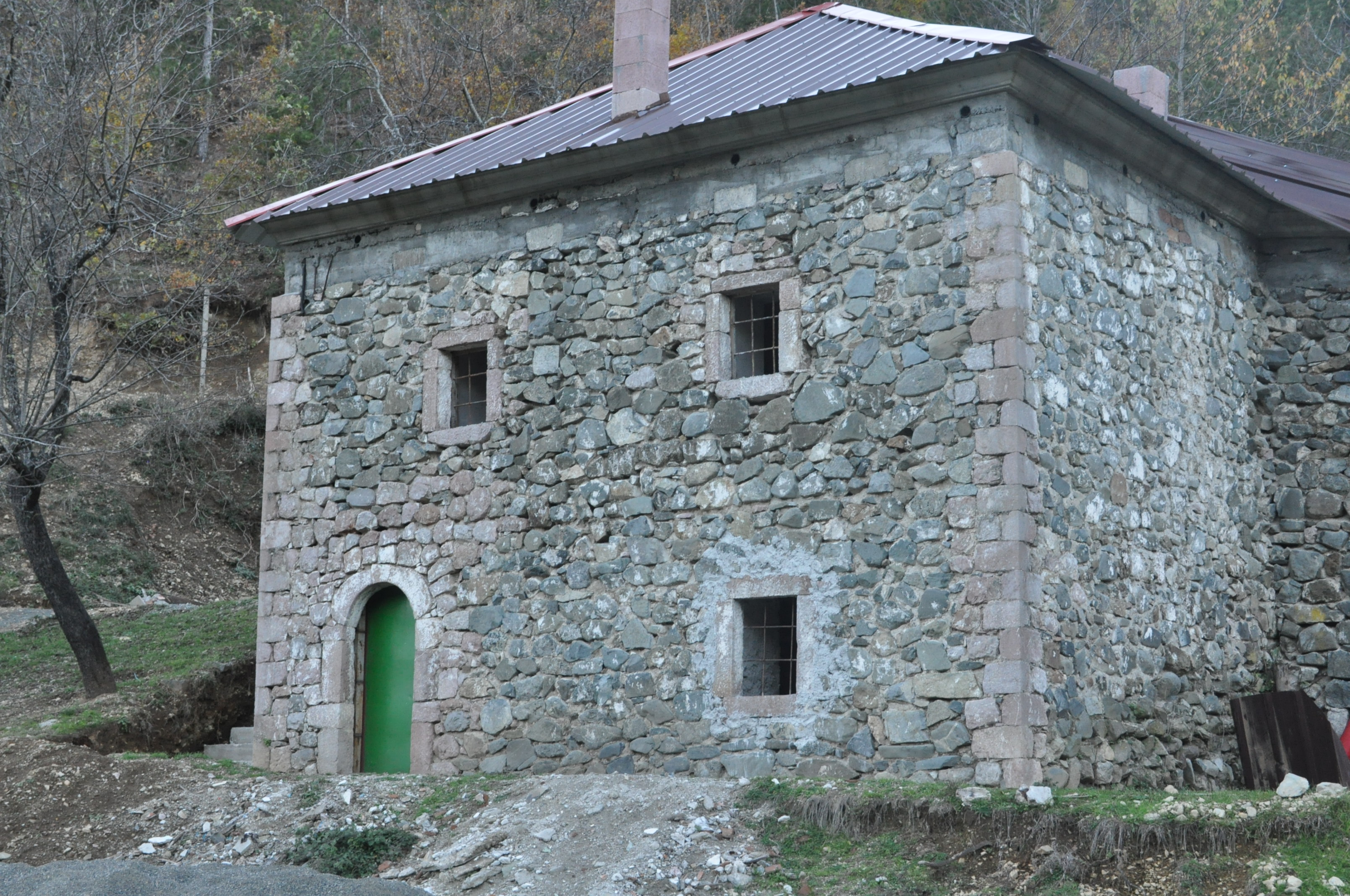 Domgjoni, Albania